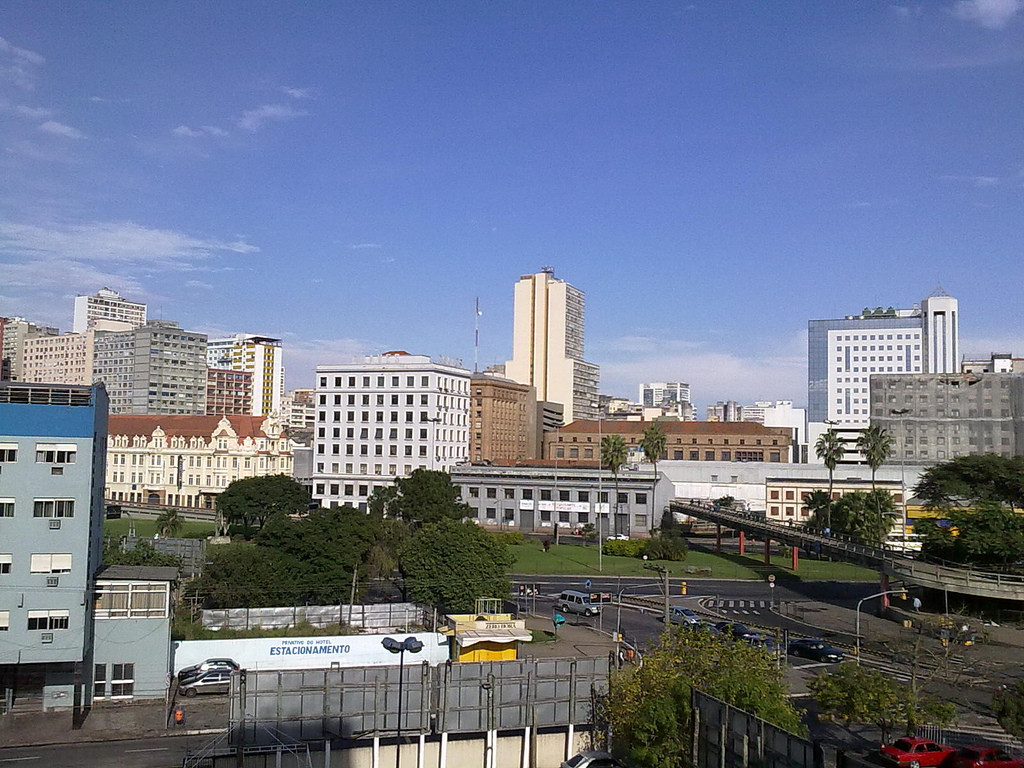 Vista da suíte luxo do Hotel Ritter, em Porto Alegre, RS.